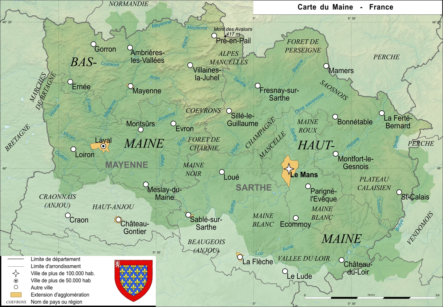 Carte de l'ancienne province française du Maine Map of the ancient french province of Maine